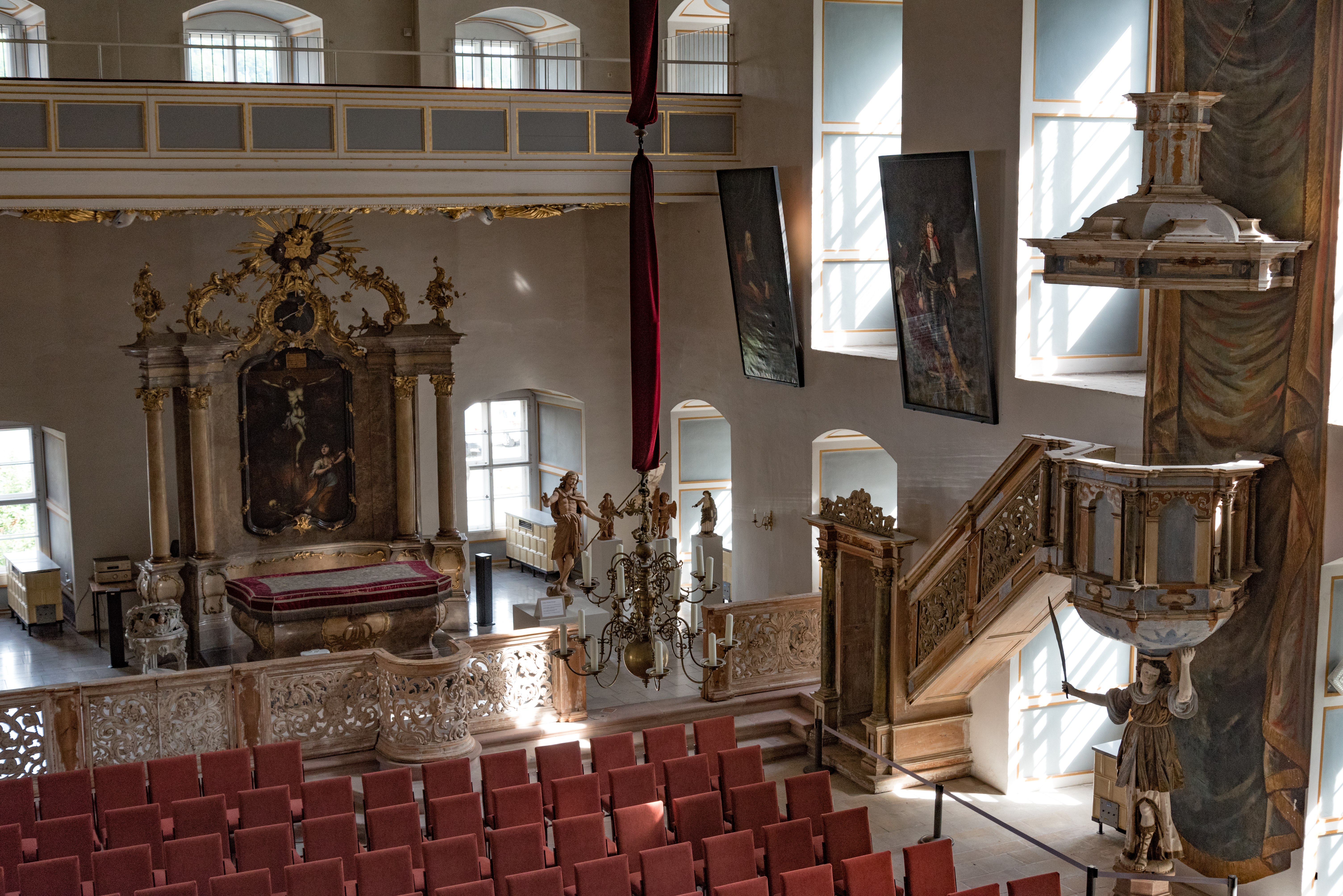 Meiningen, Schloss Elisabethenburg, Interior